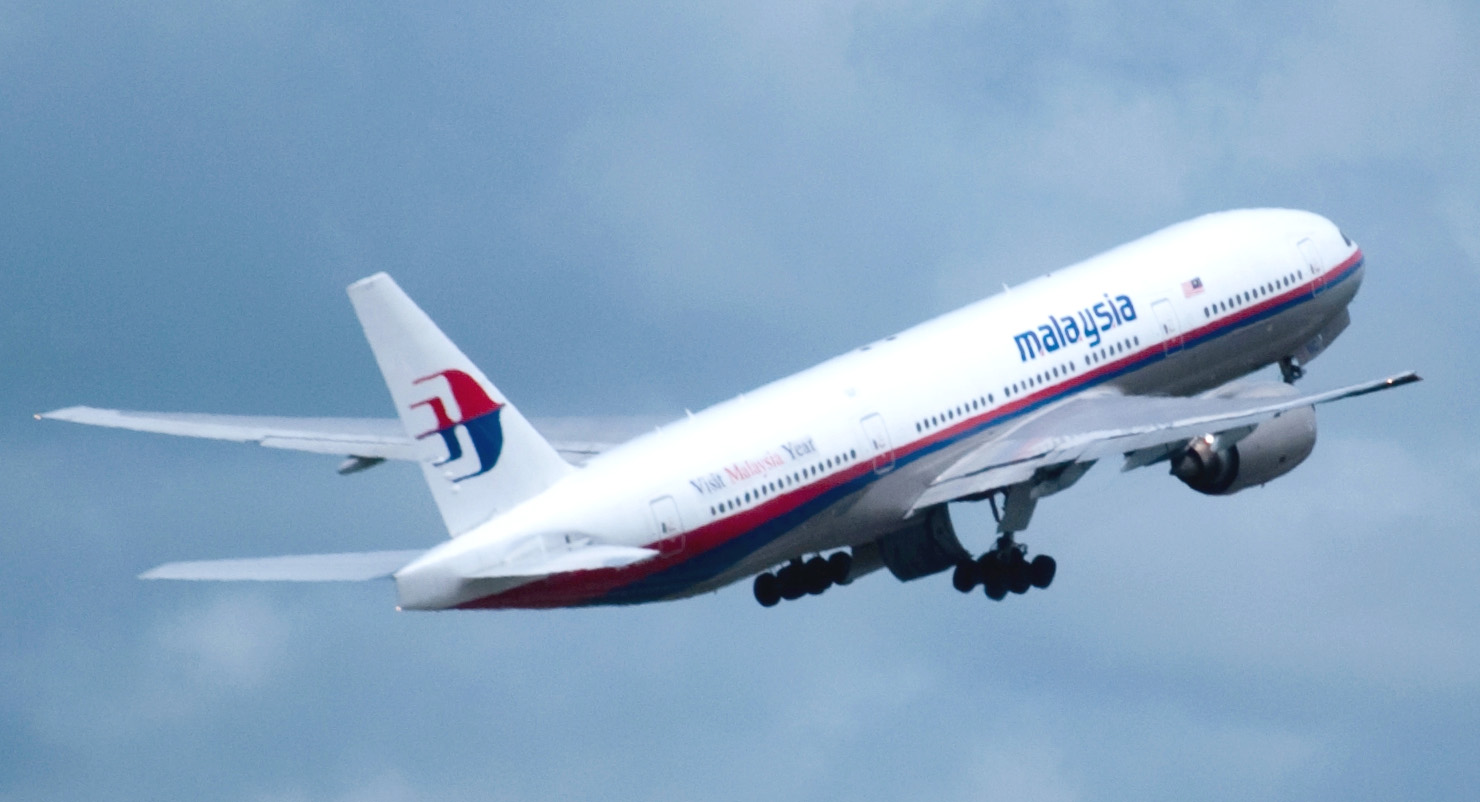 MH 777